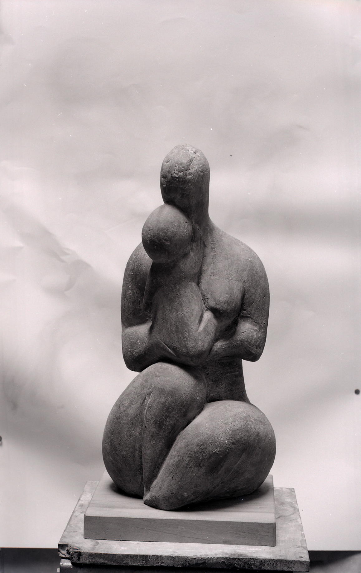 Servizio fotografico : Milano, 1960 / Paolo Monti. - Buste: 1, Fototipi: 4 : Negativo b/n, gelatina bromuro d'argento/ pellicola ; 6x6, 6x9. - ((Serie costituita da 4 negativi identificati con i nn.: 23711-23714. Numerazione parallela: 77, 96-98. Sulla busta manoscritto: "Pizzoni". La suddetta serie è contenuta nella scatola identificata con la numerazione R23214/23808. Sulla scatola manoscritto a pennarello: "Design e Arte moderna". - Fonte: Quaderno di Paolo Monti: s.t. [Soggetti e committenti] (1956-1961), presso Archivio Paolo Monti